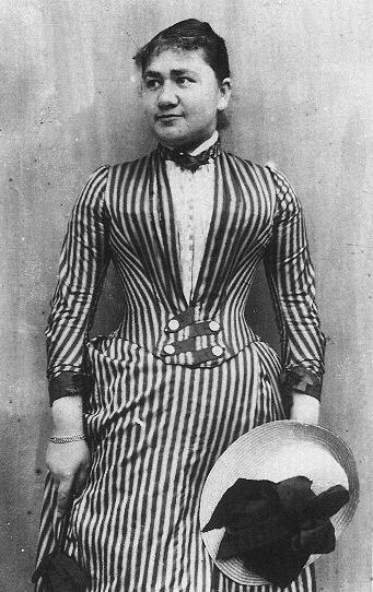 Pauline Koch, mother of Albert Einstein